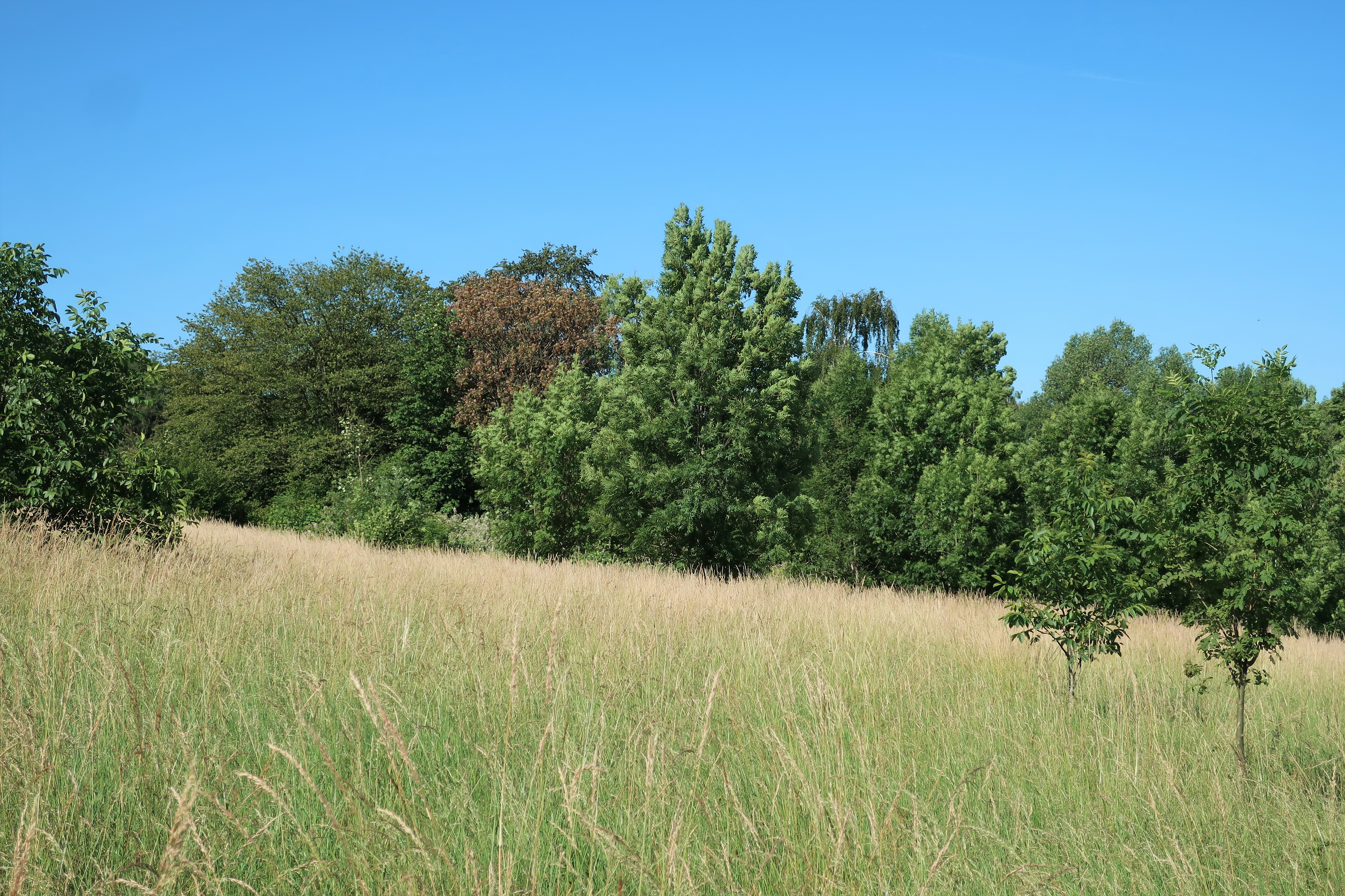 Geschützter Landschaftsbestandteil 1.4.2.64 „Feuchtgebiet Stall“ in Hagen-Westerbauer, westlich der Agnes-Miegel-Straße bei Stall. Es handelt sich um einen Bachlauf mit feuchtnassem Grünland.